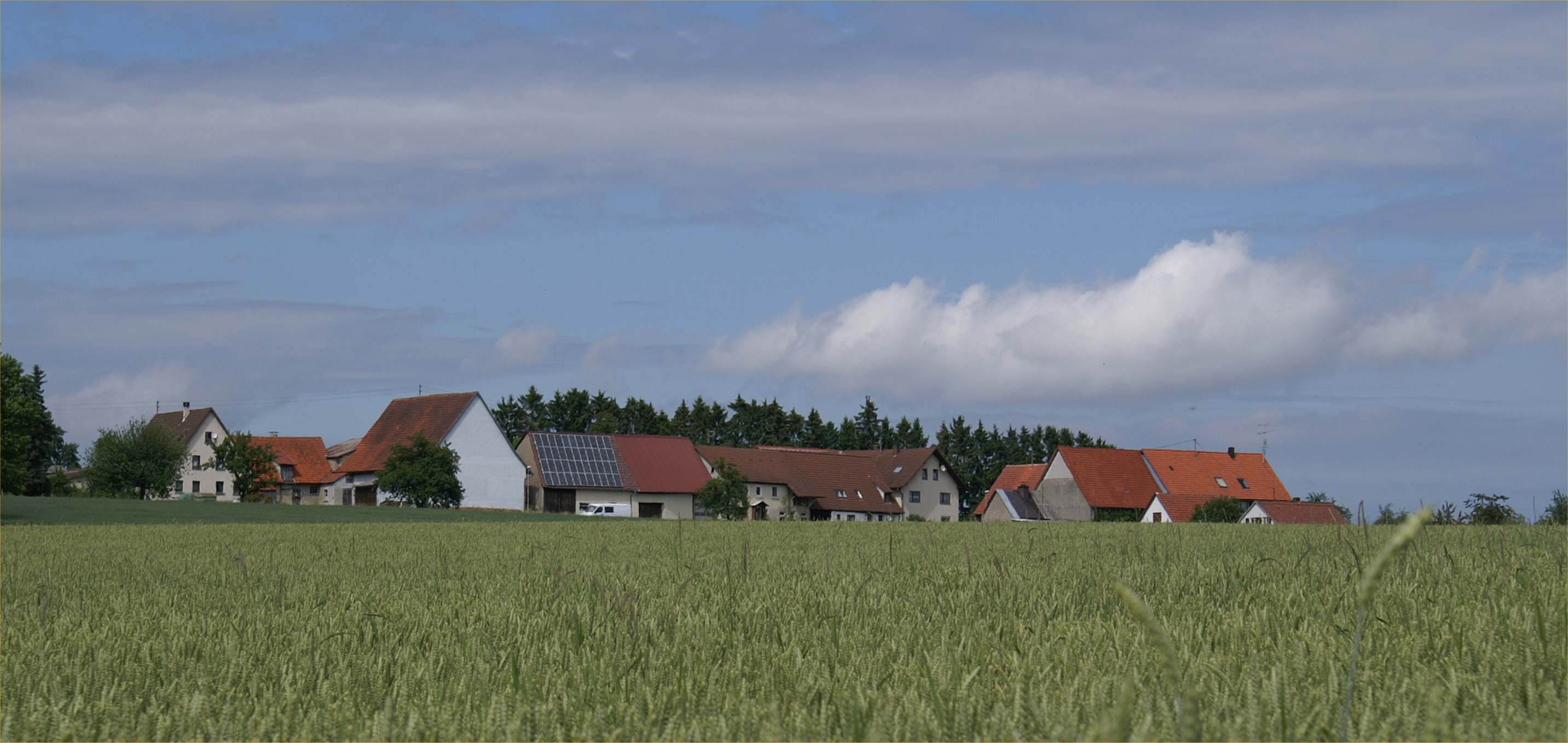 Der Weiler Widderstall auf der Schwäbischen Alb wurde am 6. Juli 1209 in einer von Papst Innozenz III. unterschriebenen Urkunde erstmals erwähnt.